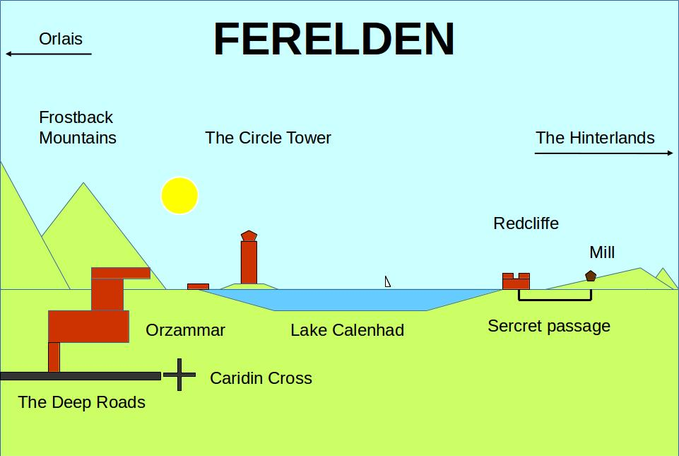 Mapa del reino de Ferelden en el videojuego Dragon Age Origins